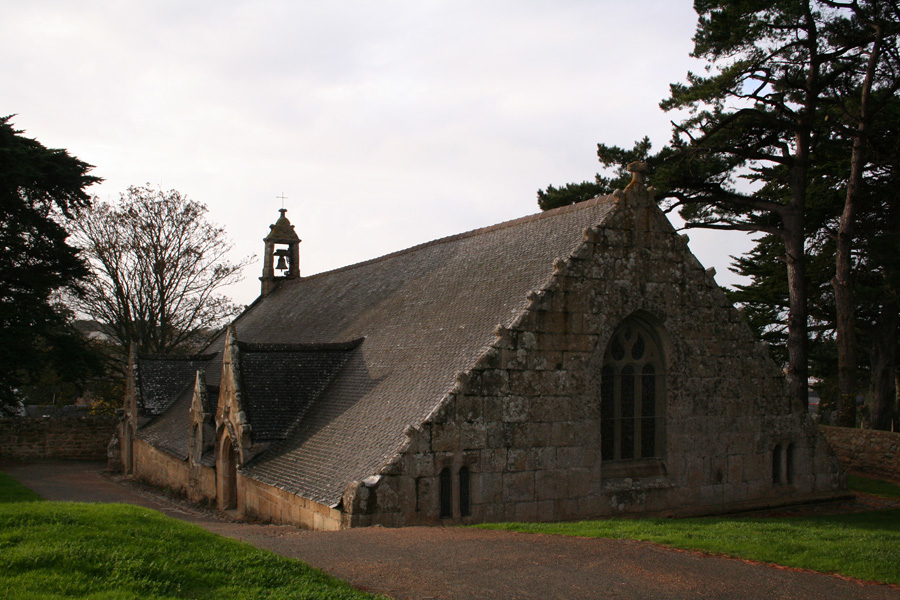 la chapelle Notre-Dame de Port-Blanc à demi enterrée date du 16ème siècle. Elle est bâtie sur les fondations d’une tour de guet du 13ème siècle sur la commune de Penvénan dans les Côtes-d'Armor.